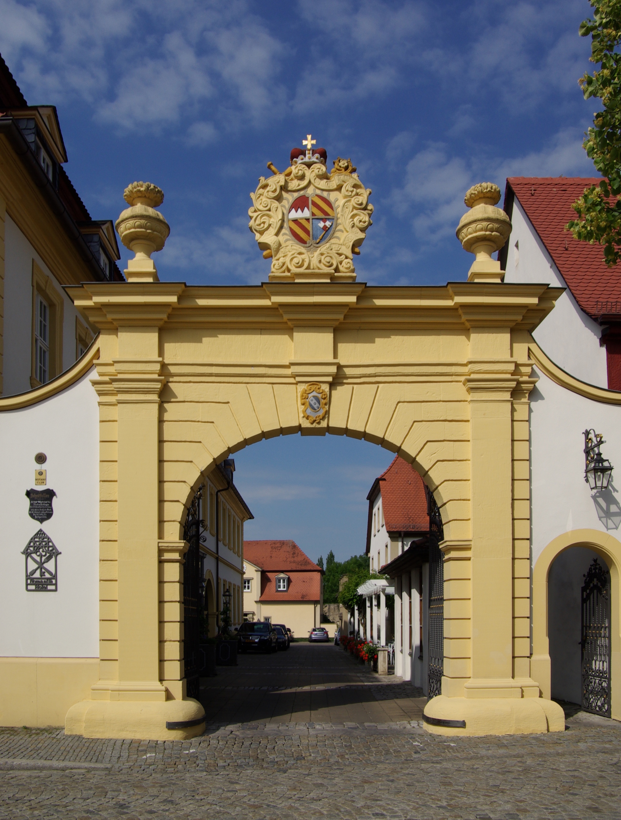 Iphofen, Zehntkeller, Einfahrt mit dem Wappen des Christoph Franz von Hutten (1724-1729).